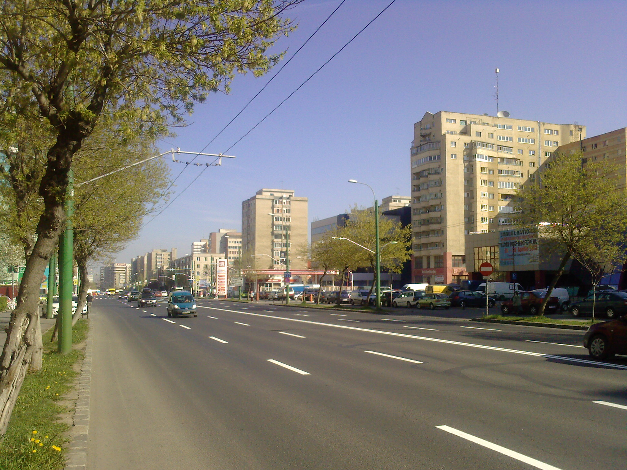 Cartierul Scriitorilor, Braşov, România